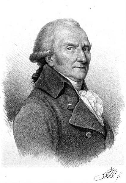 Портрет живописця Яна Богуміла Плерша.